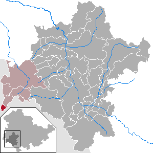 Birx in Thuringia - District Schmalkalden-Meiningen